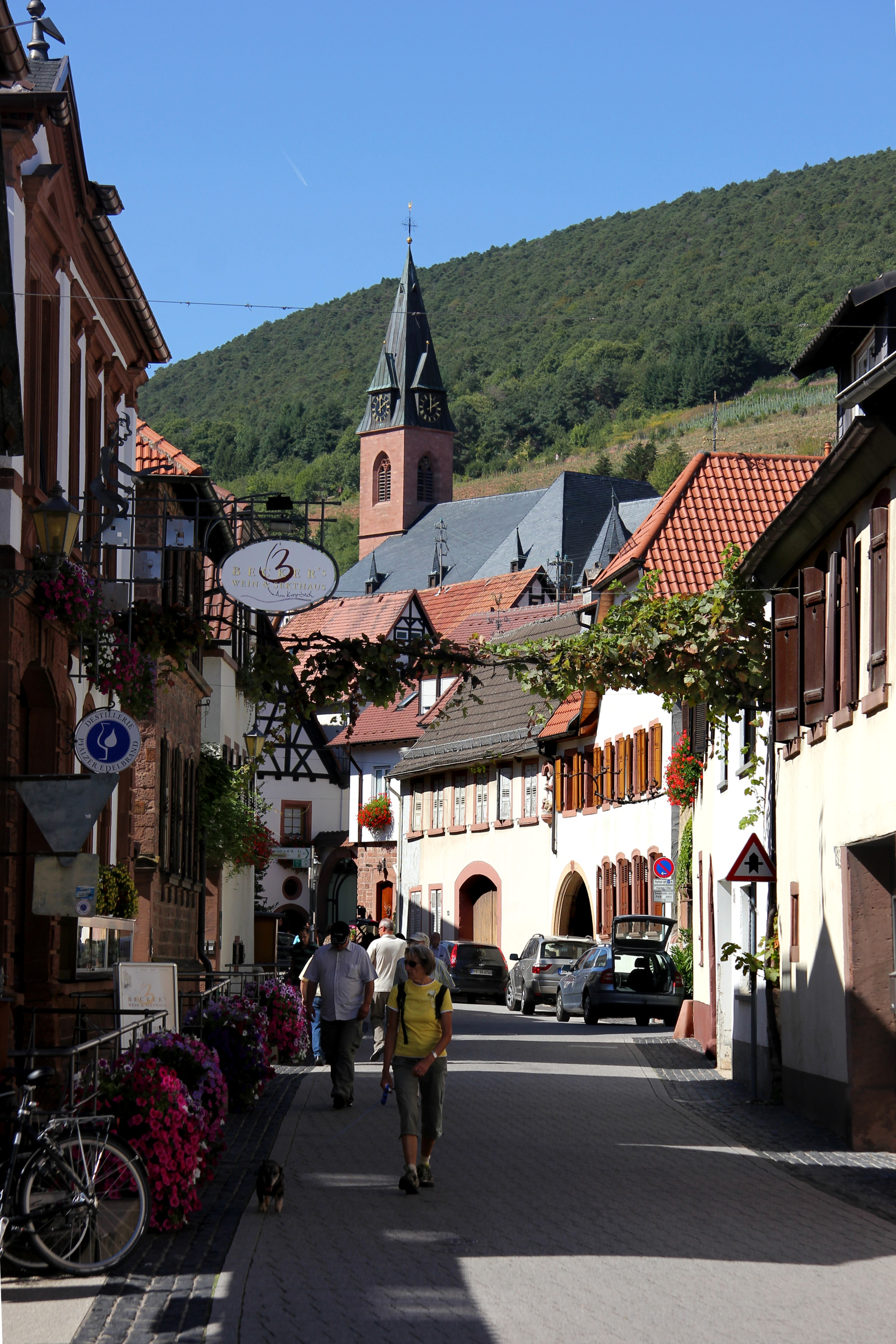 St. Martin (Pfalz), Maikammerer Straße